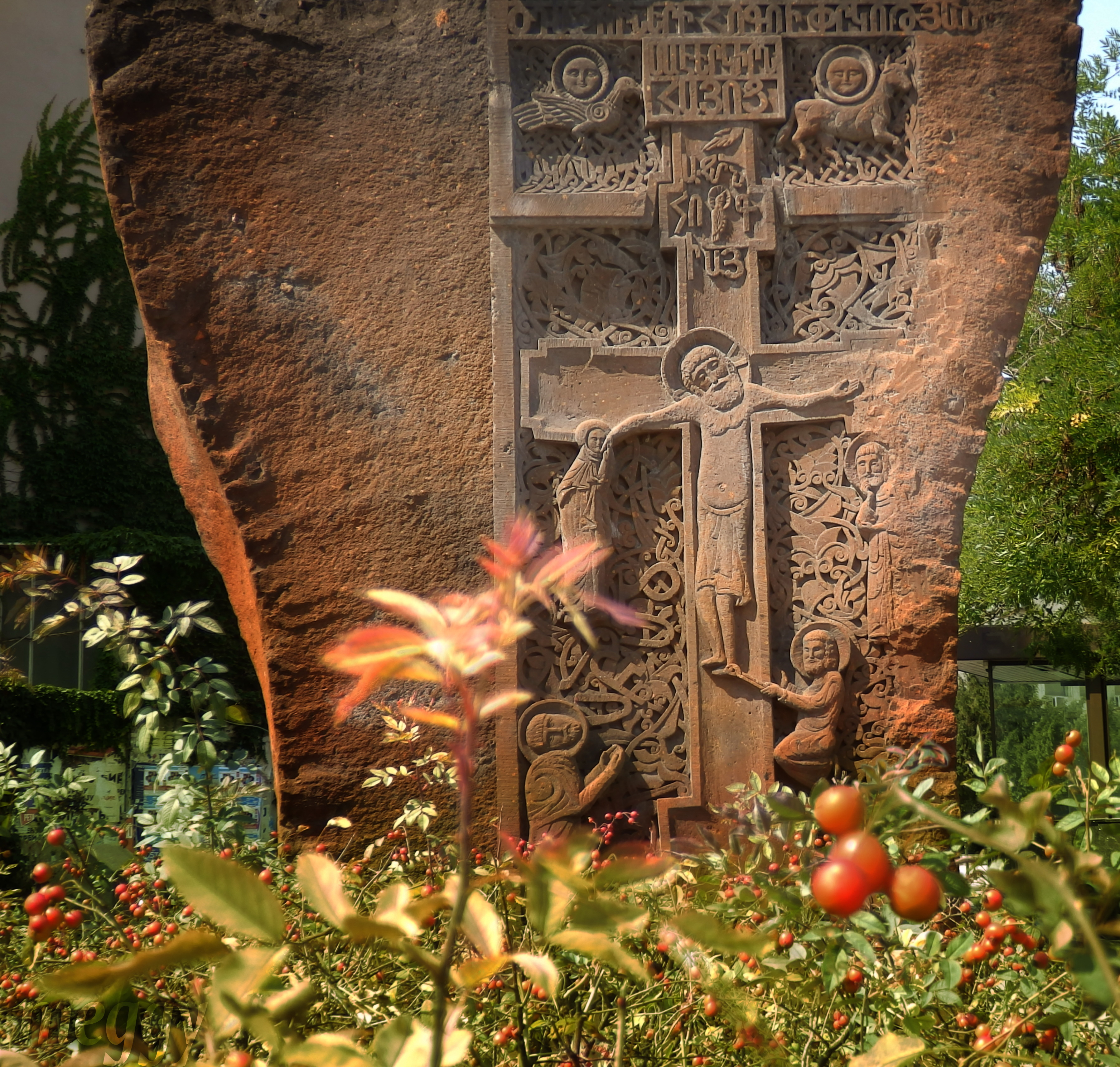 Srpski (latinica): Hačkar ( Khachkar ), spomen-obeležje vazduhoplovcima poginulim pri prevozu pomoći postradalima od zemljotresa u Jermeniji 1988. godine